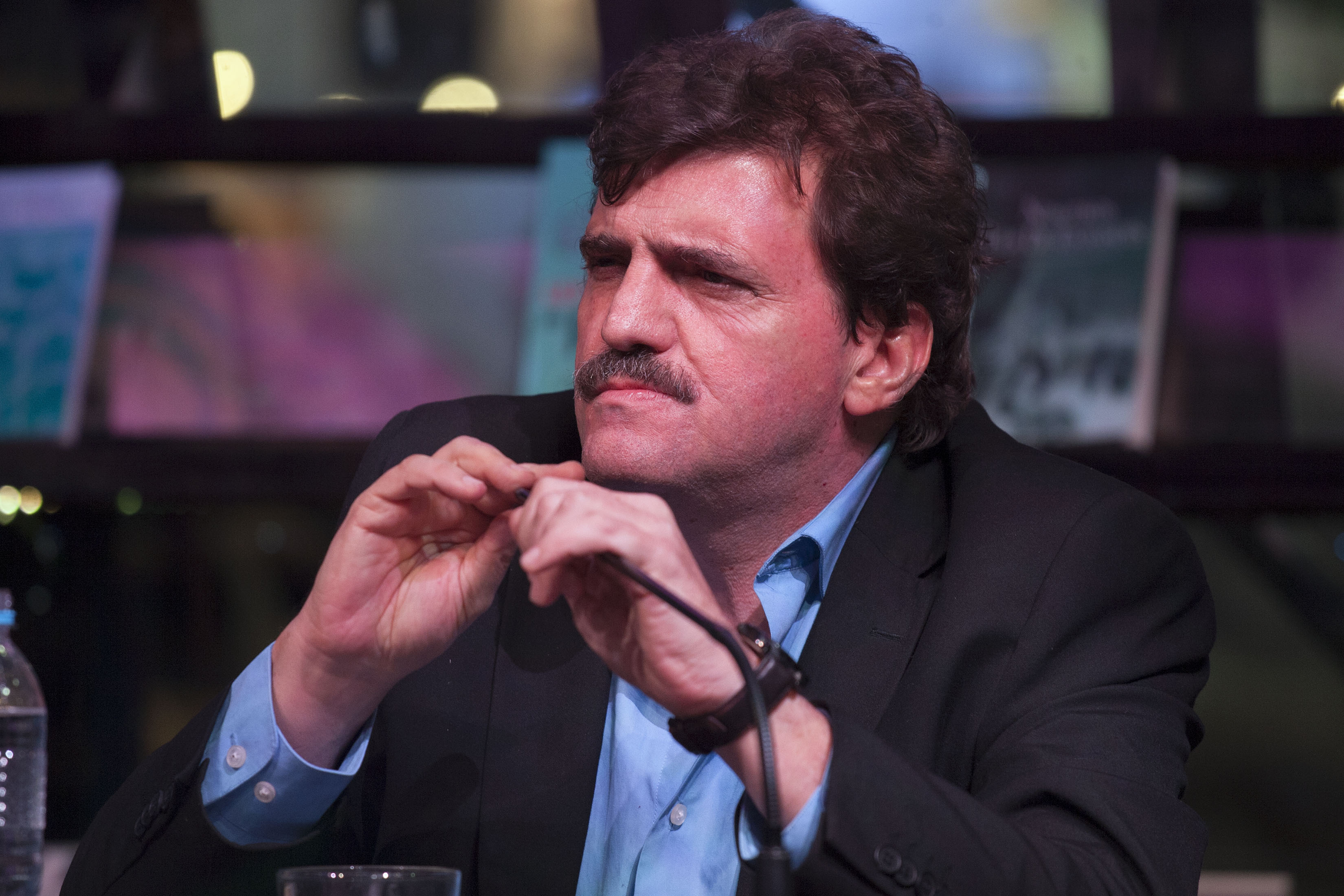 Domingo, 10 de Mayo 2015. En el marco de la 41a Feria Internacional del Libro de Buenos Aires se realizó la presentación del libro La doble Vida de Jesús (editorial Alfaguara) con el autor, Enrique Serna en el Stand de la Ciudad de México. Foto: Antonio Nava / Secretaría de Cultura Ciudad de México.